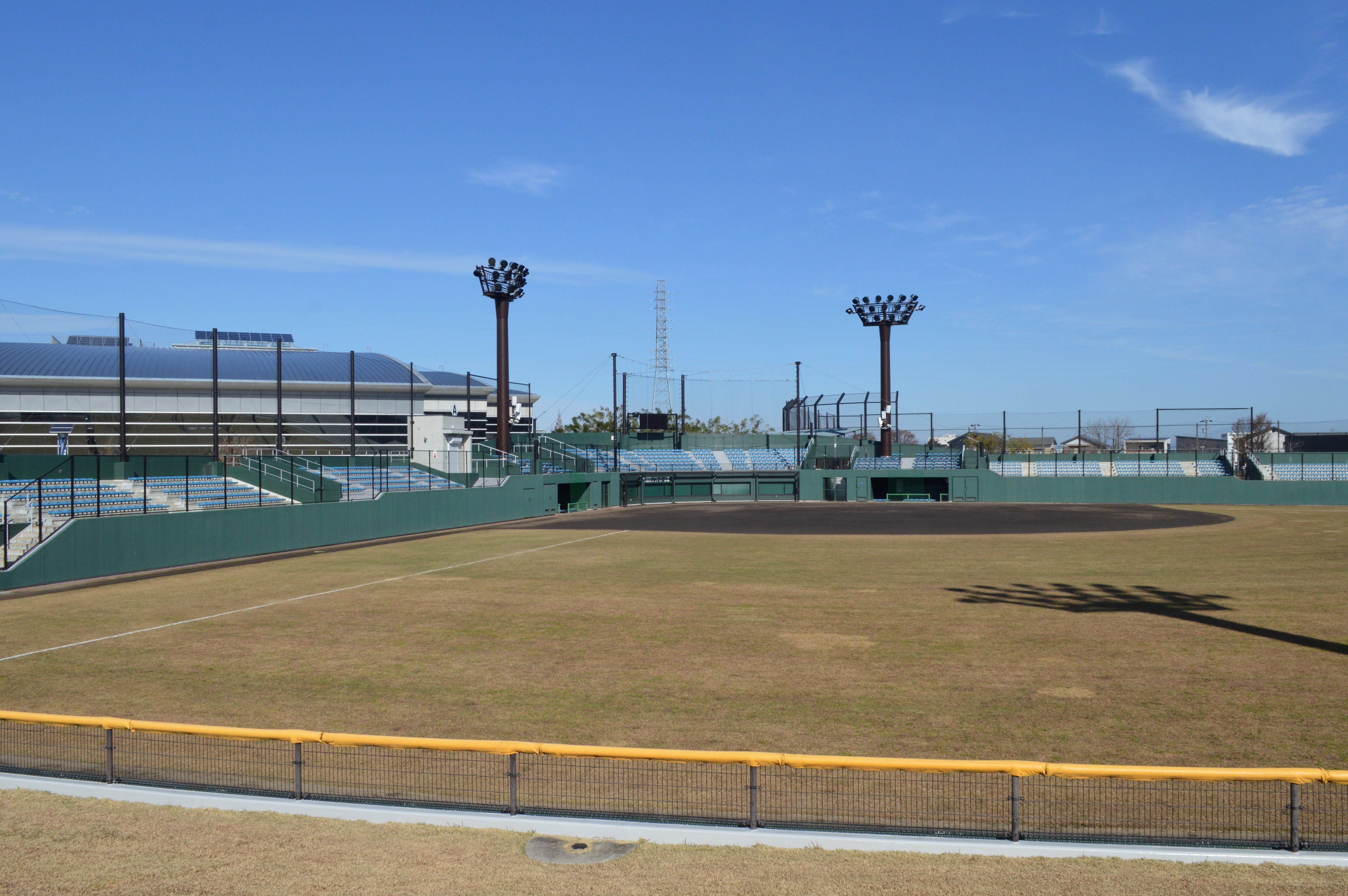 愛知県安城市の安城市総合運動公園。ソフトボール場。